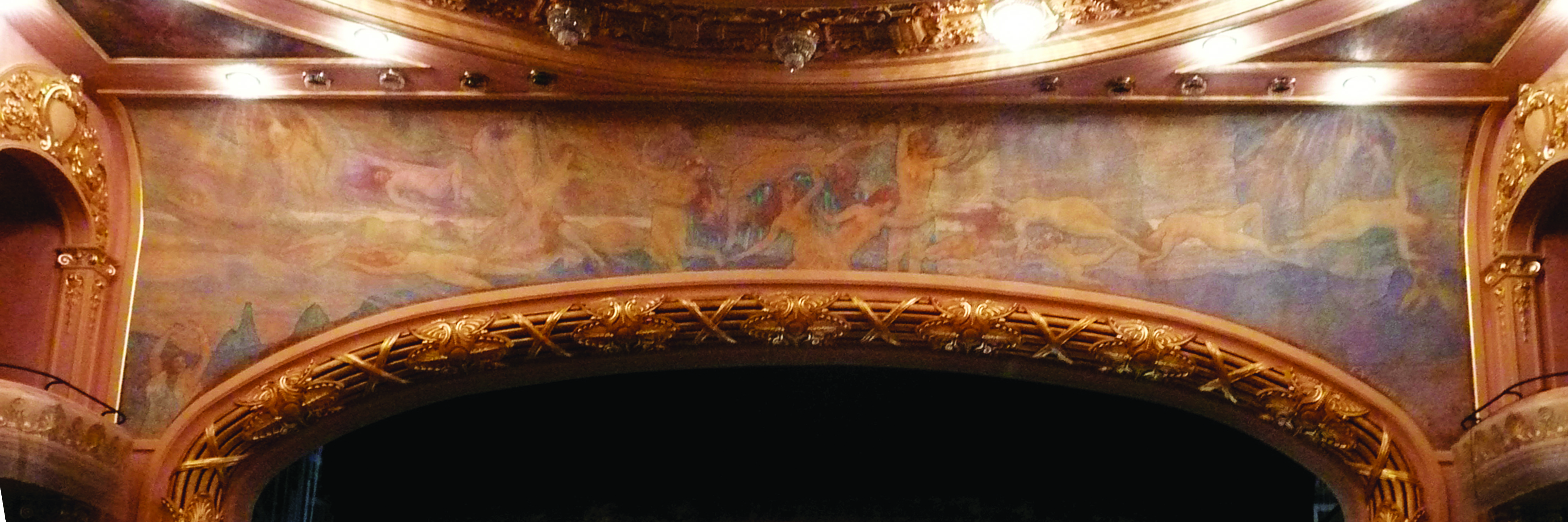 Obra do Projeto Eliseu Visconti